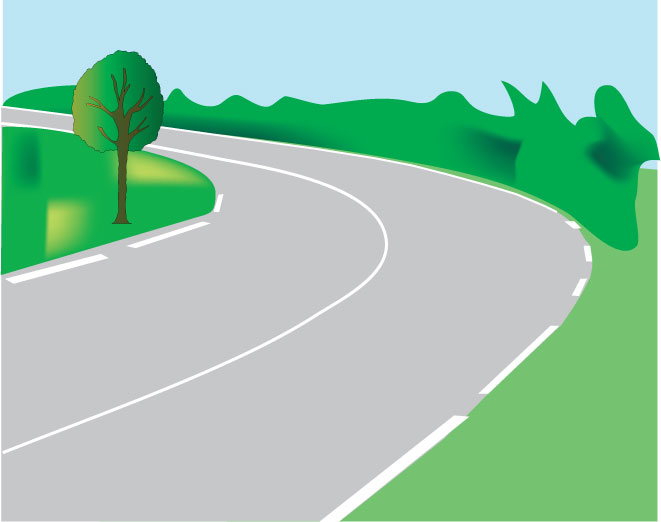 Classe A de signalisation des virages en France